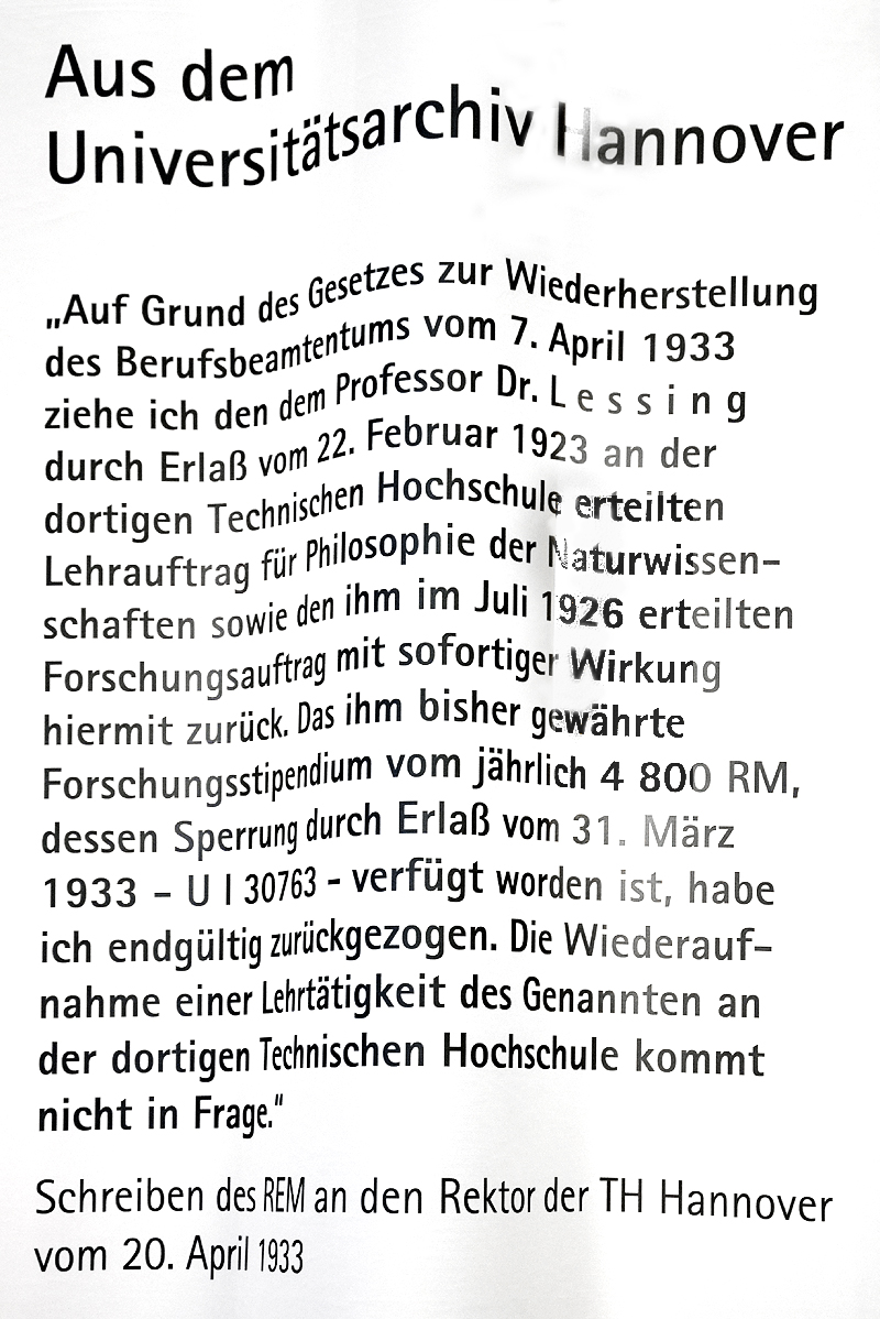 Ausschnitt aus einem Transparent mit einem Zitat aus dem Schreiben des Reichsministeriums für Wissenschaft, Erziehung und Volksbildung (REM) an den seinerzeitigen Rektor der Technischen Universität Hannover vom 20. April 1933: „Auf Grund des Gesetzes zur Wiederherstellung des Berufsbeamtentums vom 7. April 1933 ziehe ich den dem Professor Dr. Lessing durch Erlaß vom 22. Februar 1923 an der dortigen Technischen Hochschule erteilten Lehrauftrag für Philosophie der Naturwissenschaften sowie den ihm im Juli 1926 erteilten Forschungsauftrag mit sofortiger Wirkung hiermit zurück. Das ihm bisher gewährte Forschungsstipendium von jährlich 4800 RM, dessen Sperrung durch Erlaß vom 31. März 1933 - U I 30763 - verfügt worden ist, habe ich endgültig zurückgezogen. Die Wiederaufnahme einer Lehrtätigkeit des Genannten an der dortigen Technischen Hochschule kommt nicht in Frage.“ Zitat des Schreibens aus dem Universitätsarchiv Hannover anläßlich der am 20. November 2013 abgehaltenen Gedenkveranstaltung Verleihung und Entzug von Titeln während der NS-Zeit an der Technischen Hochschule Hannover ...